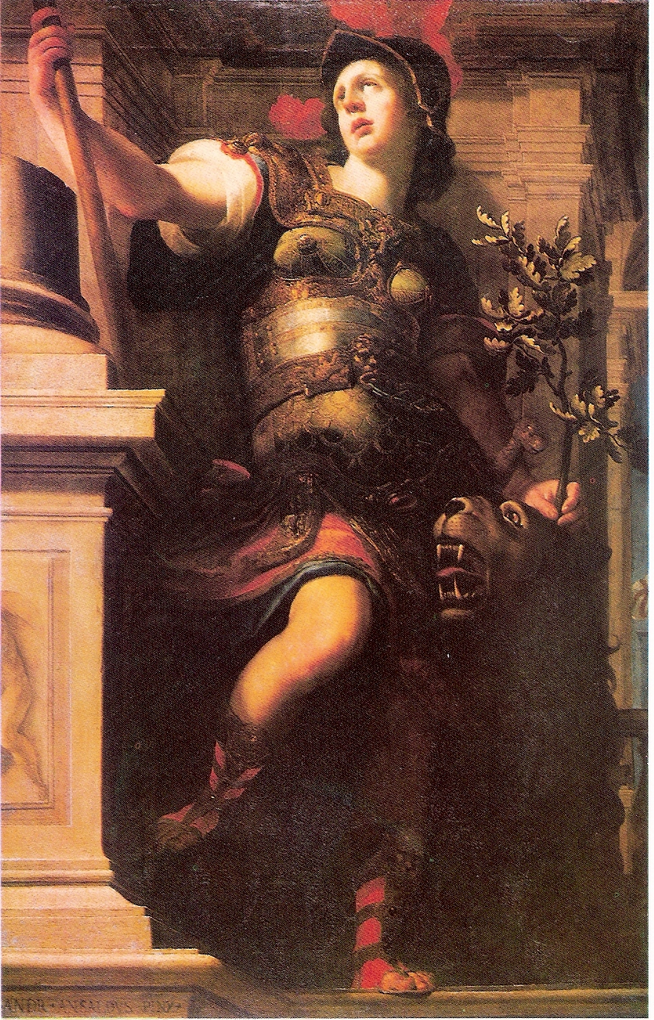 Dipinto "La Fortezza" del pittore Giovanni Andrea Ansaldo (1628) presso Palazzo Doria-Tursi di Genova